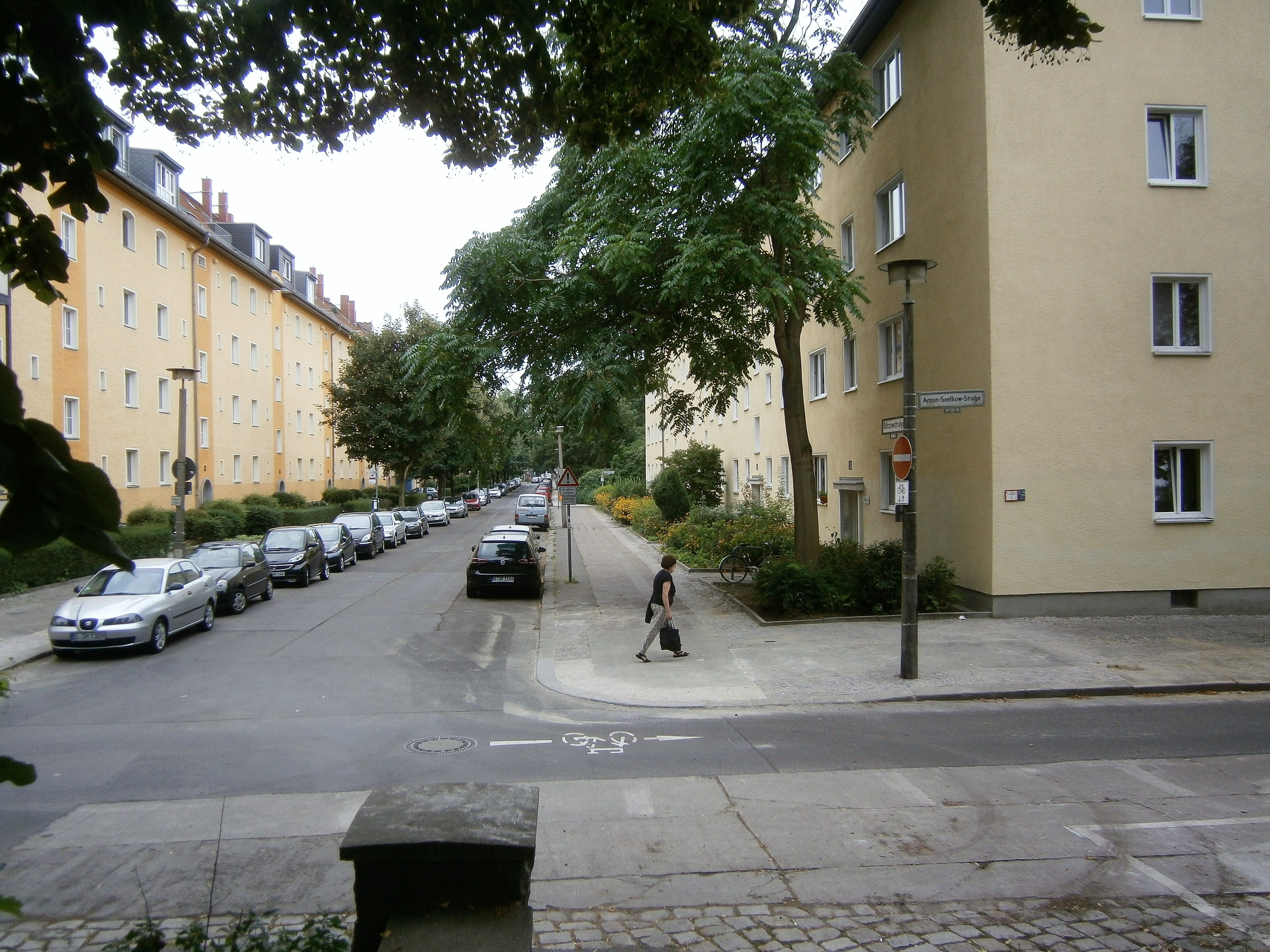 Der Anton-Saefkow-Park ist ein Park im Norden der Grünen Stadt in Berlin, Ortsteil Prenzlauer Berg, Bezirk Pankow. Bild: Blick nach Süden vom Park in die Bötzowstraße.